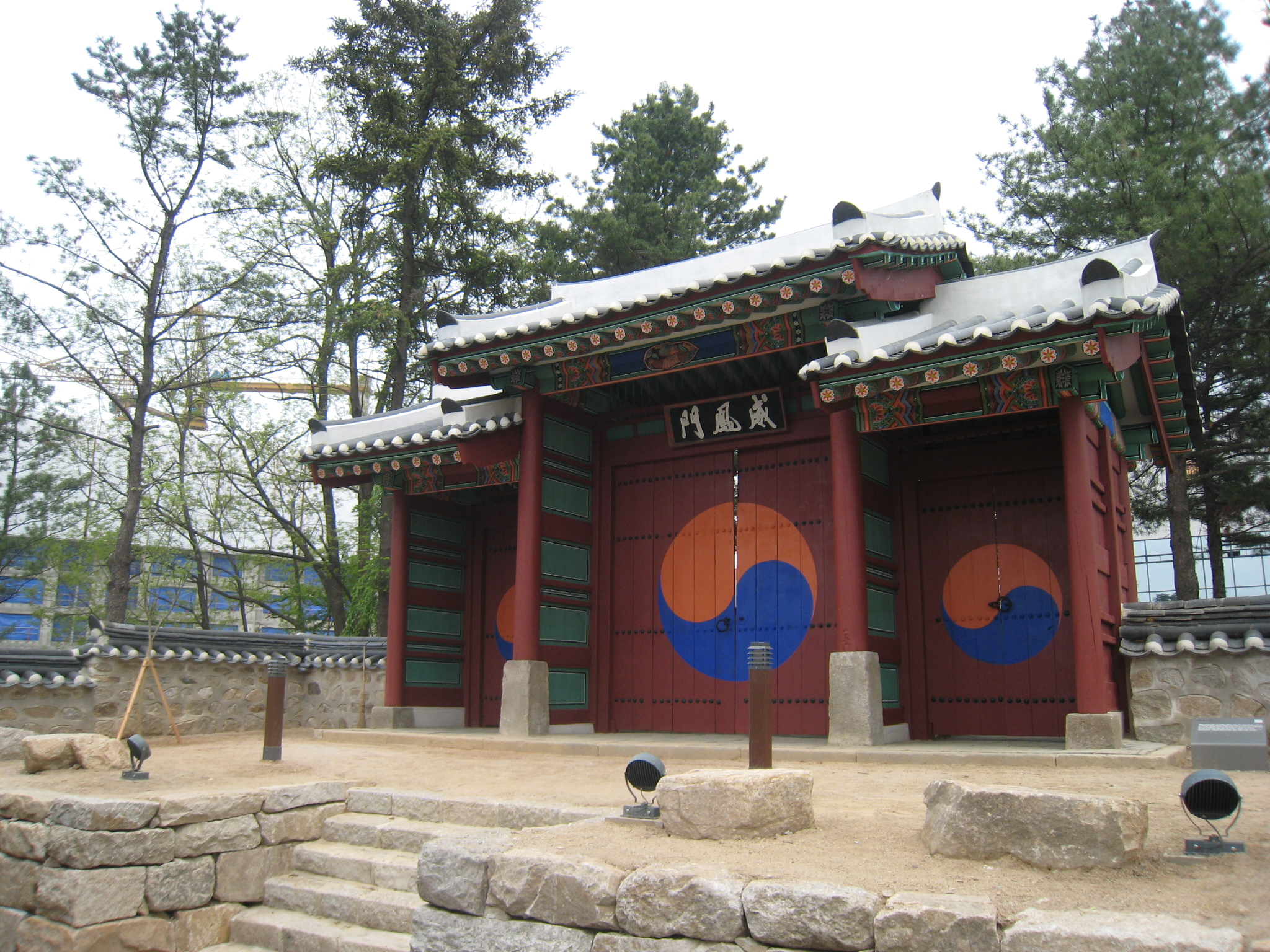 강원도 유형문화재 제1호 위봉문 (威鳳門)